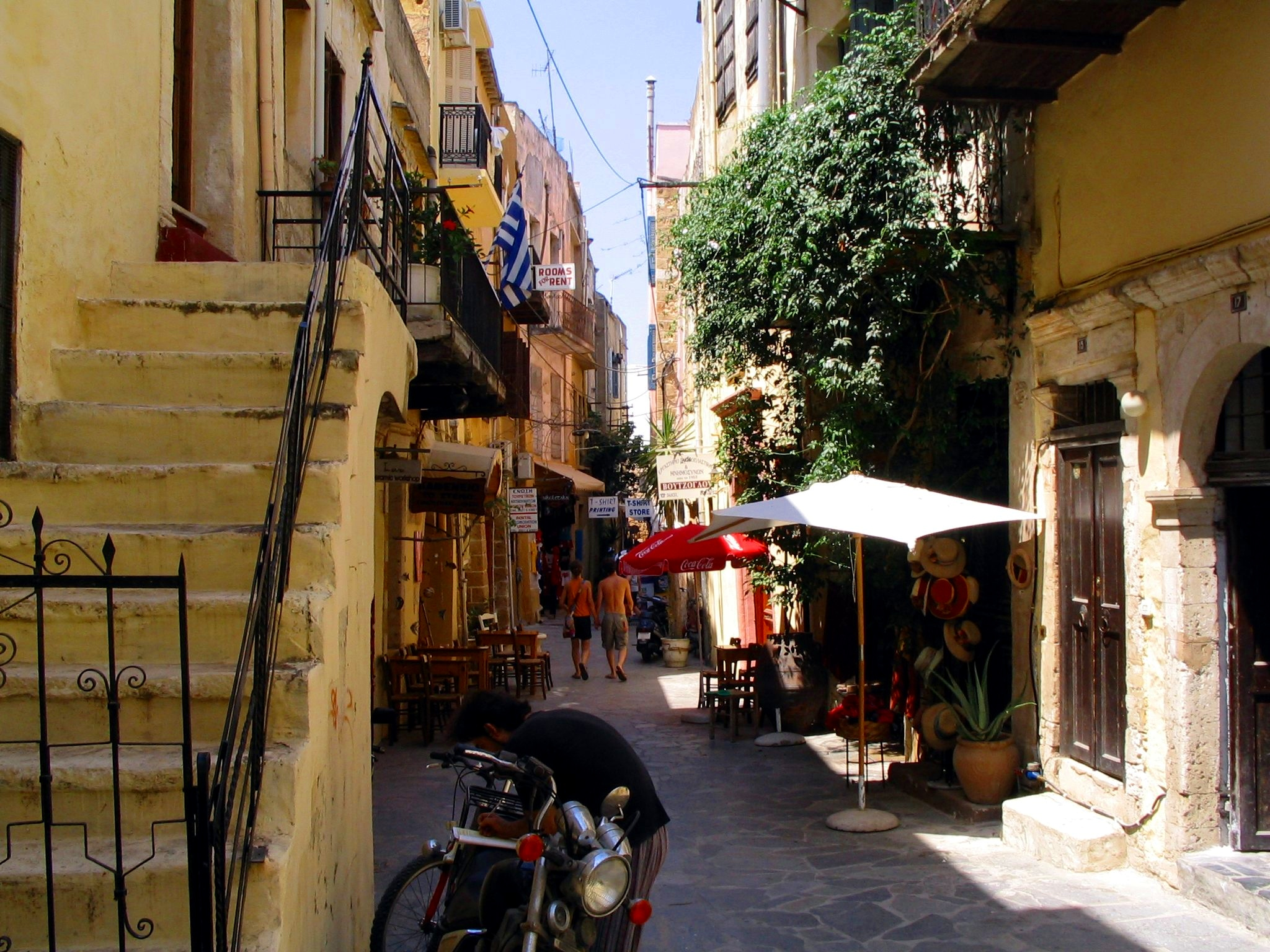 Eine Gasse in Chania, Kreta, Griechenland